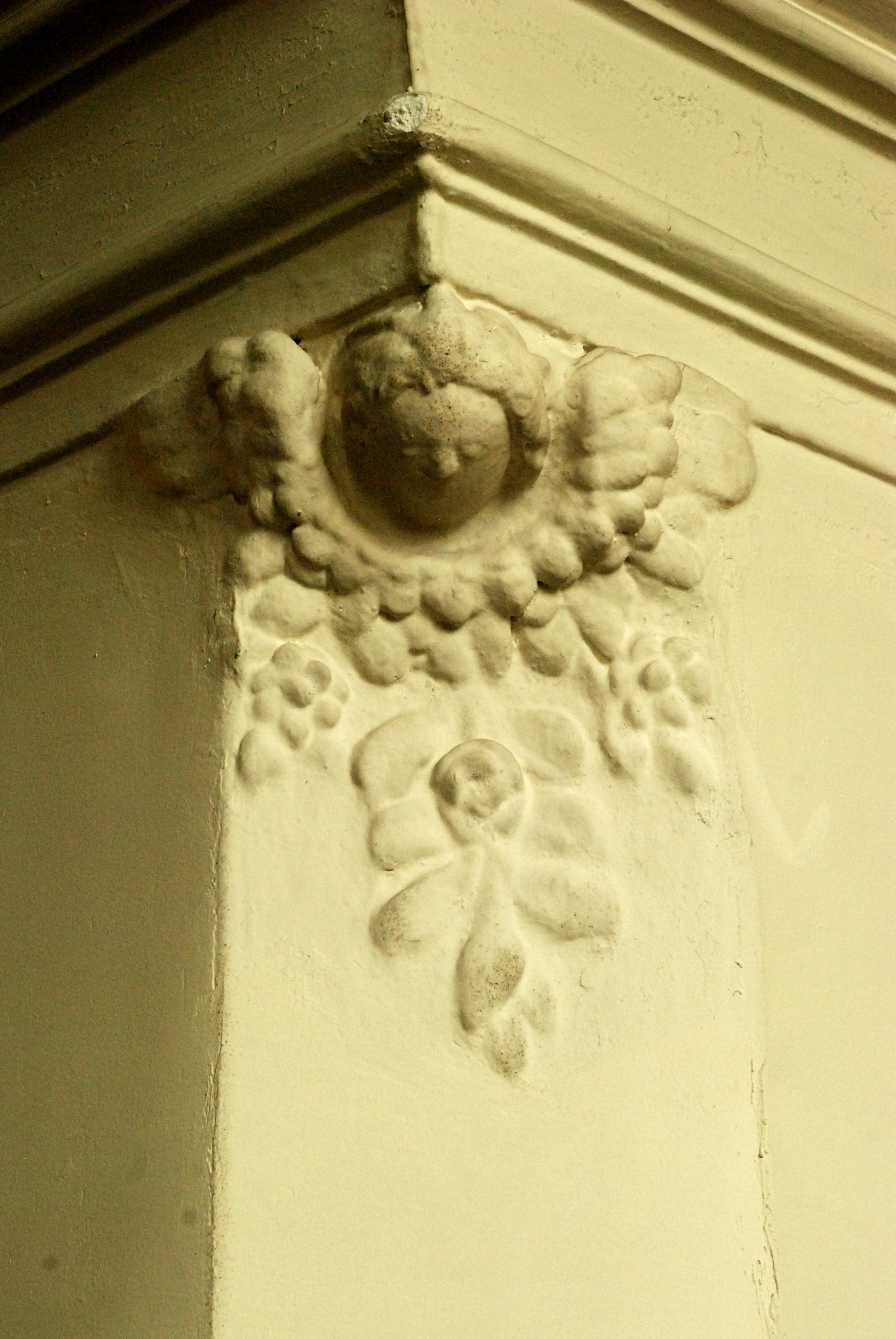 Belgique - Brabant wallon - Ottignies - Église Notre-Dame de Mousty